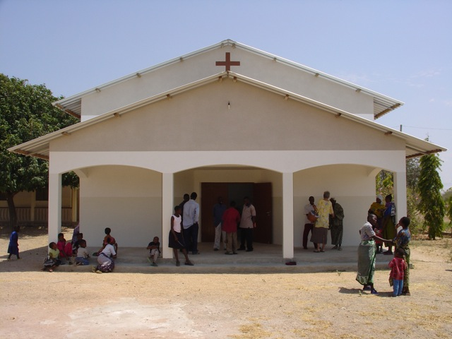 Kiswahili: Kanisa la Biblia Dodoma.